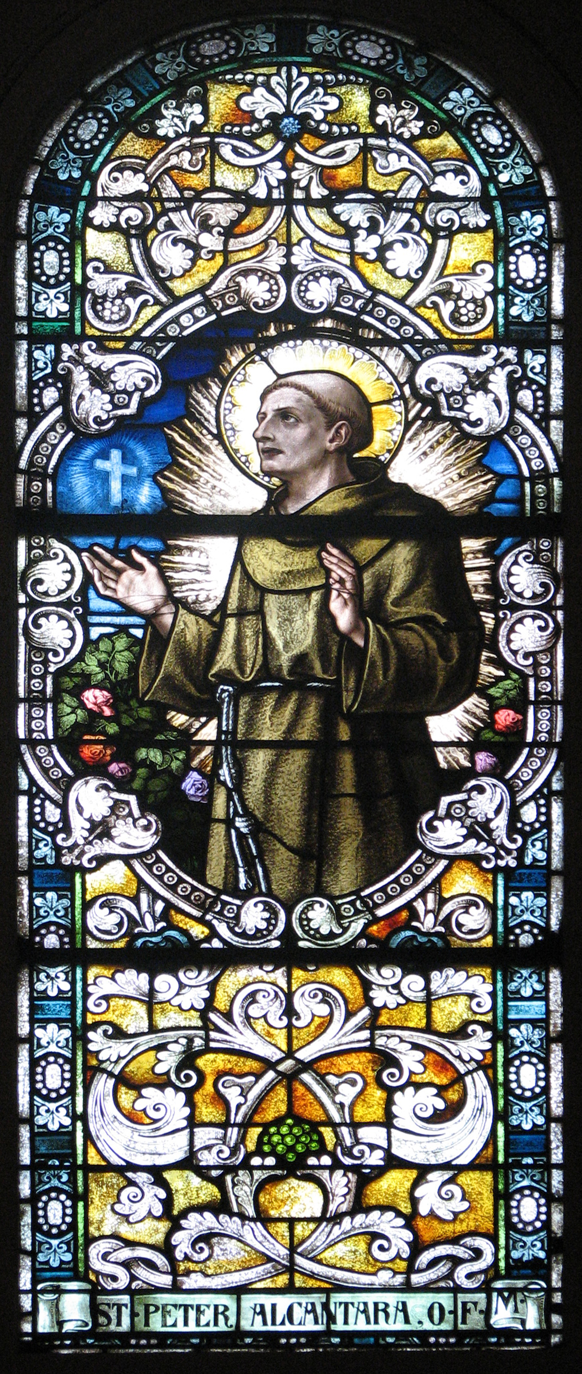 Witraż przedstawiający św. Piotra z Alkantary w kościele franciszkanów w Waszyngtonie. Zdjęcie autora hasła o św. Piotrze z Alkantary w polskiej Wikipedii. 2006 rok.